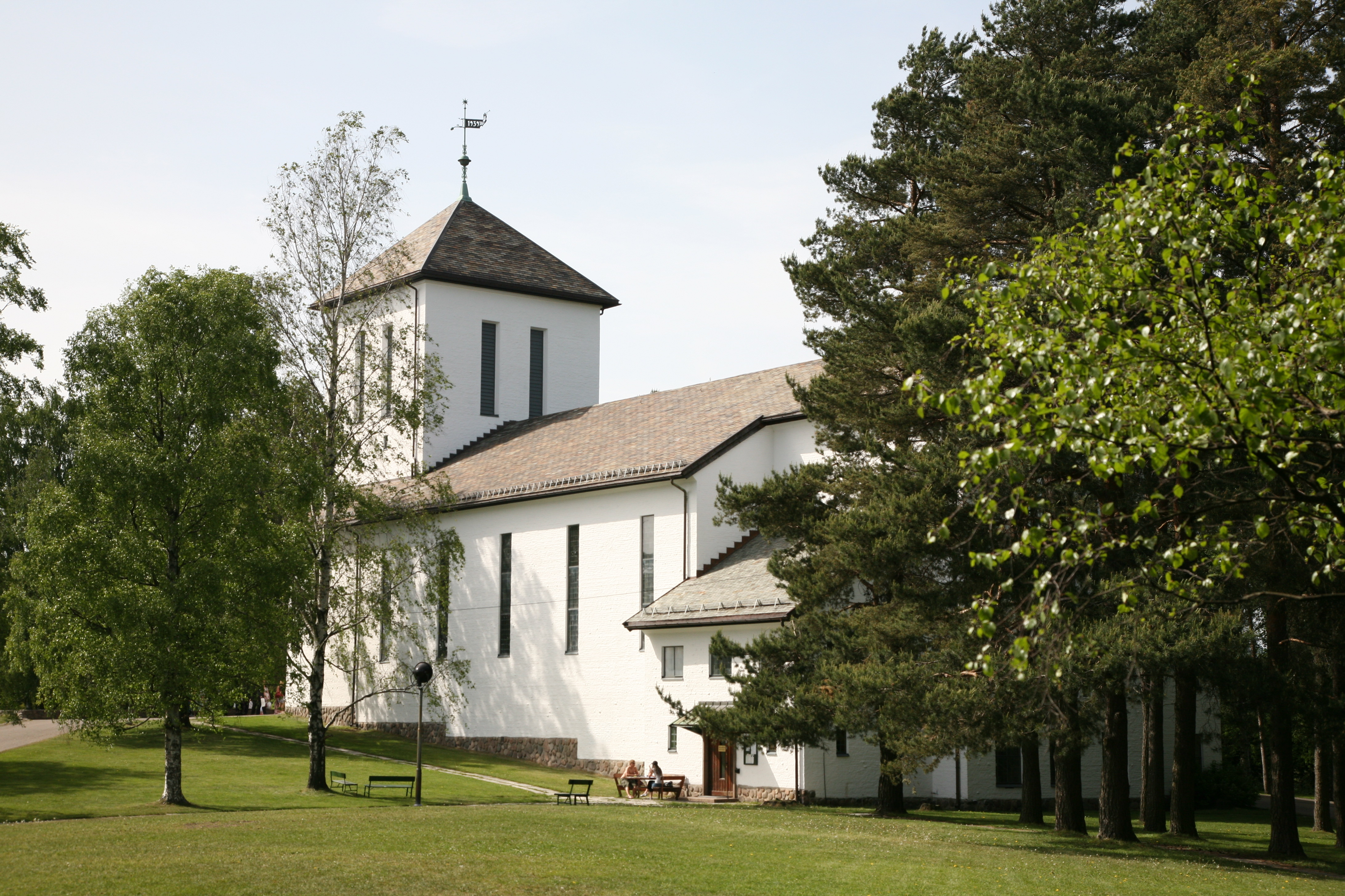 Grefsen church i Oslo, Norway